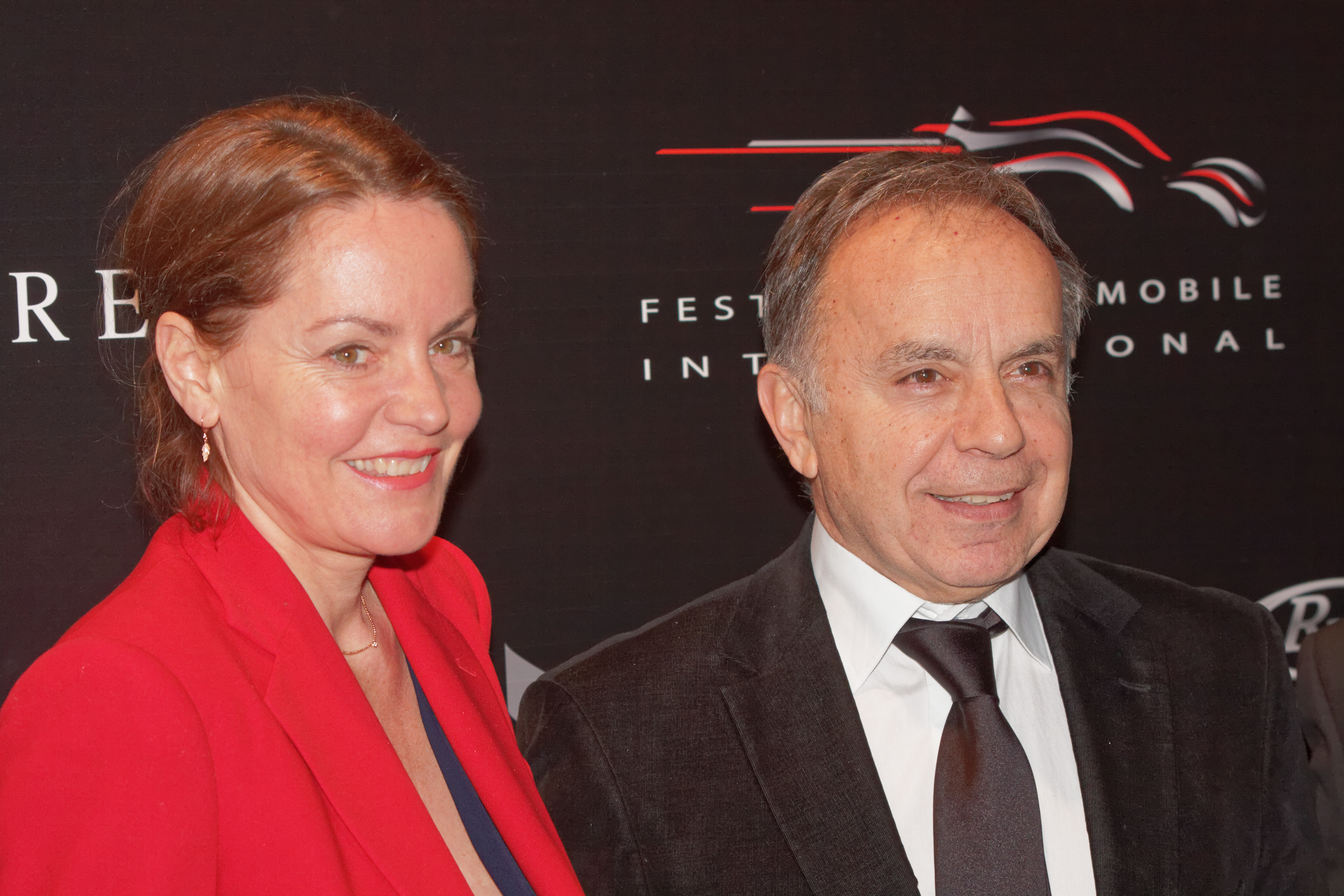 Cendrine et Patrice Dominguez posant lors du photocall du festival automobile 2014.